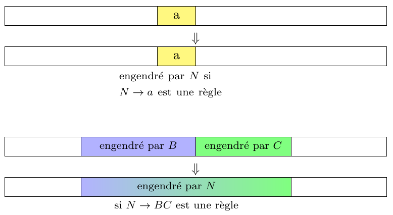 Algorithme de CYK